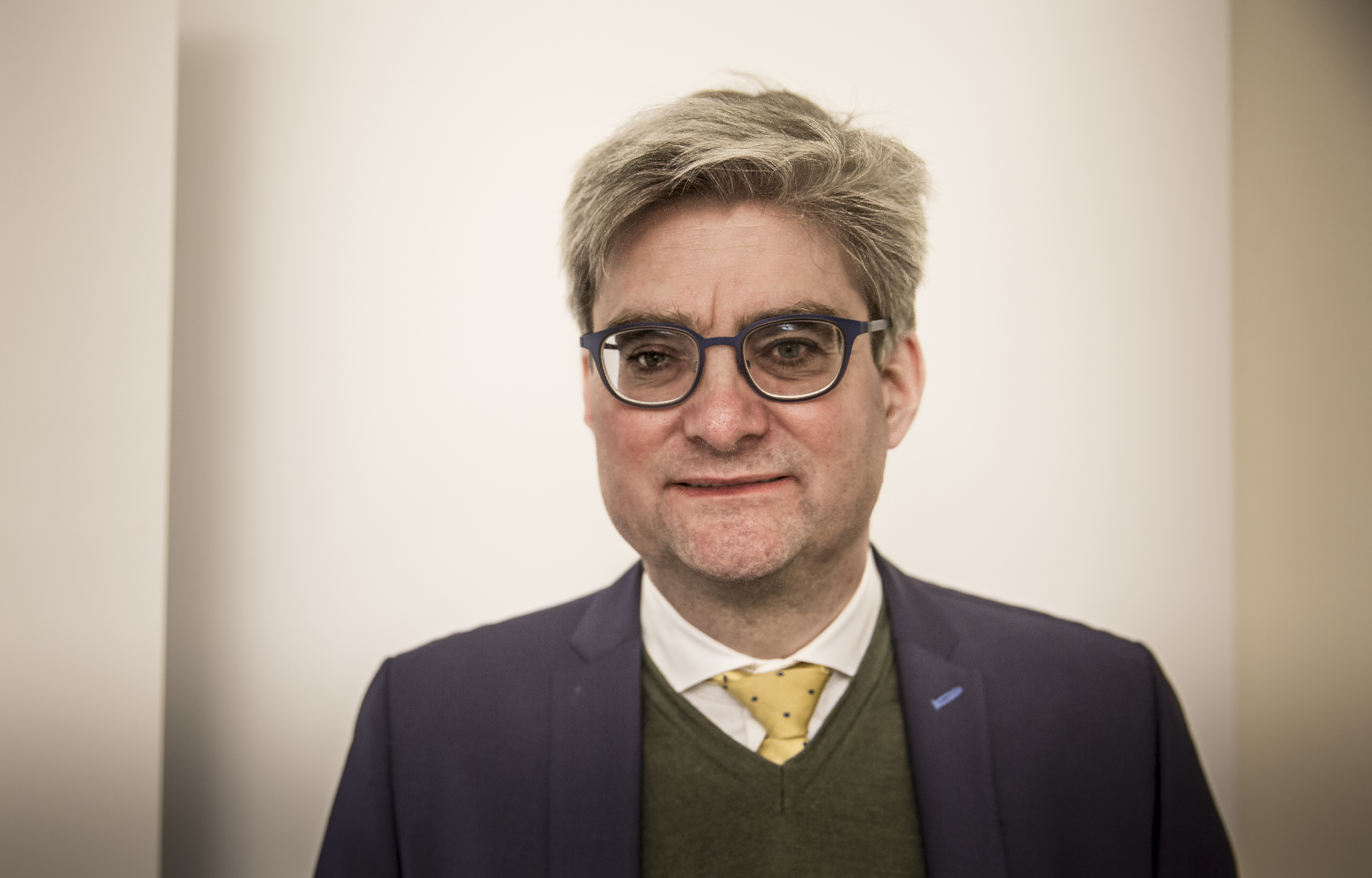 Danmarks utbildnings- och forskningsminister Søren Pind besökte tillsammans med en grupp Folketingsledamöter byggplatsen för forskningsanläggningen ESS i Lund